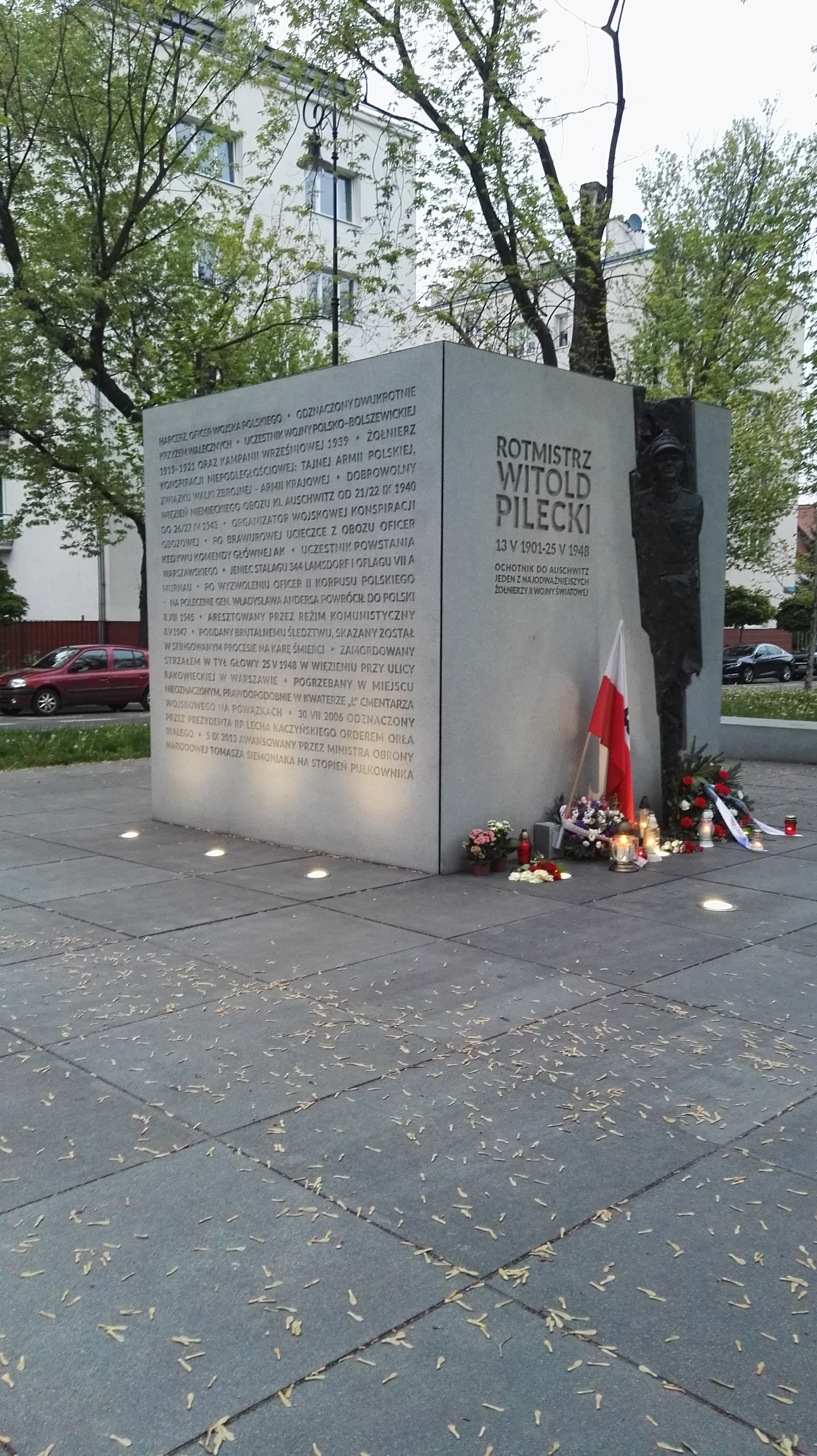 Pomnik Witolda Pileckiego w Warszawie 13.05.2020 w rocznicę urodzin